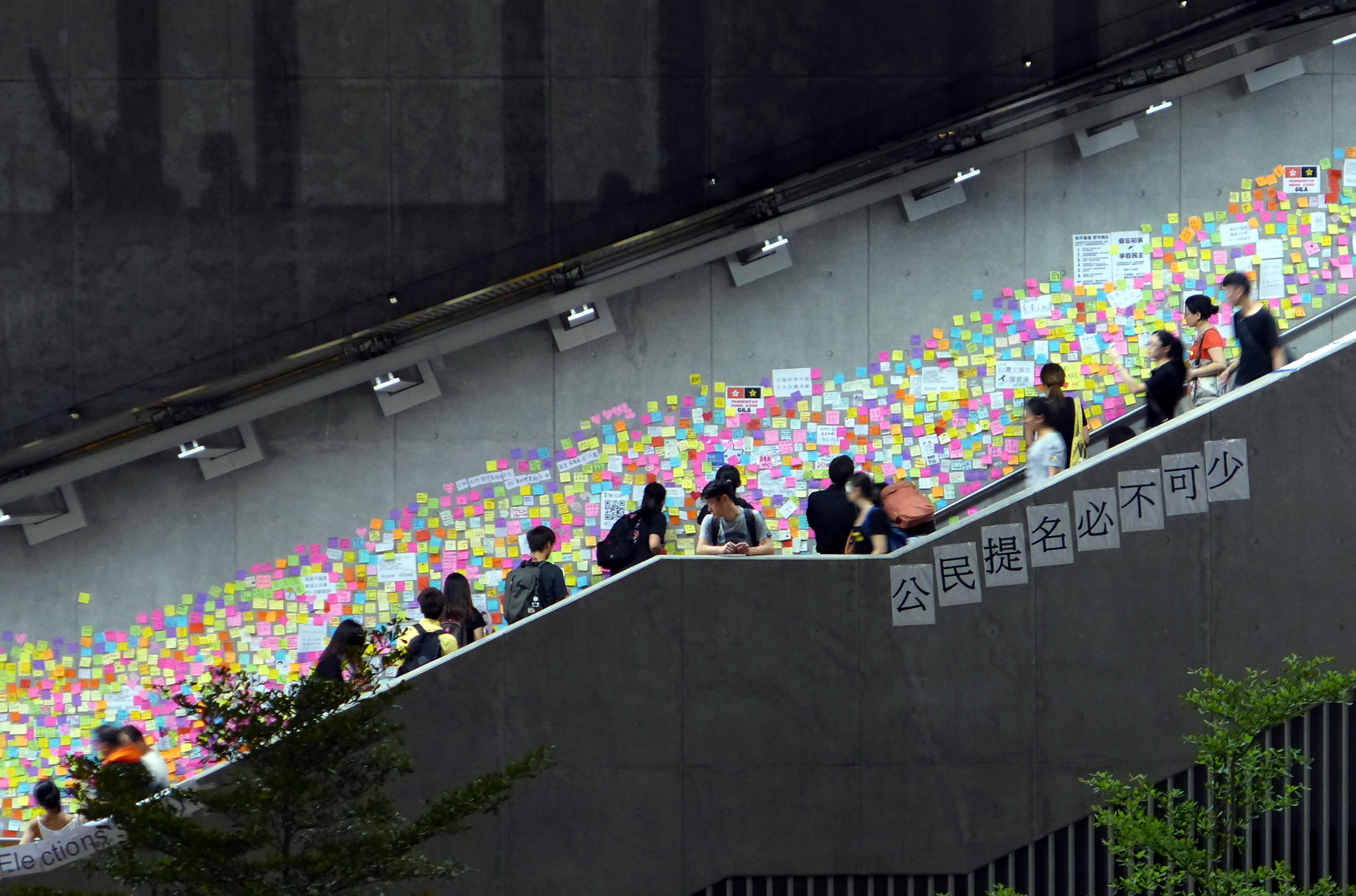 Lennon Wall Hong Kong